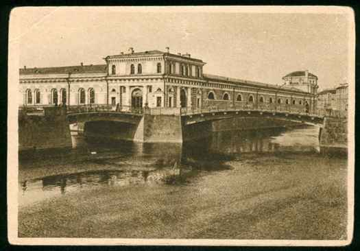 Открытка с видом Тройного моста через реку Мойку и канал Грибоедова в Санкт-Петербурге. Театральный и Ново-Конюшенный мосты